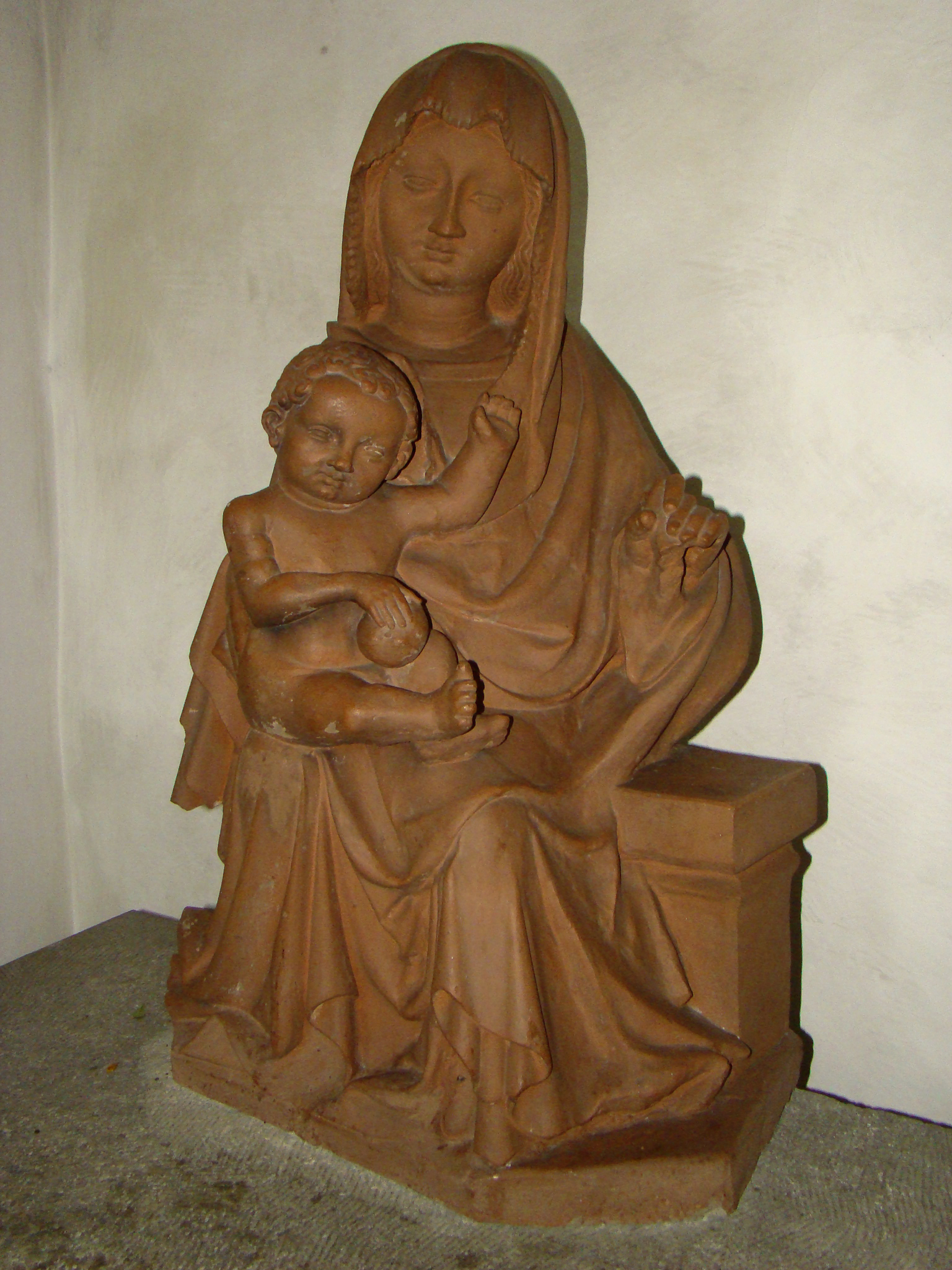 Klosterkirche (Neckarsulm), Madonna vom Scheuerberg